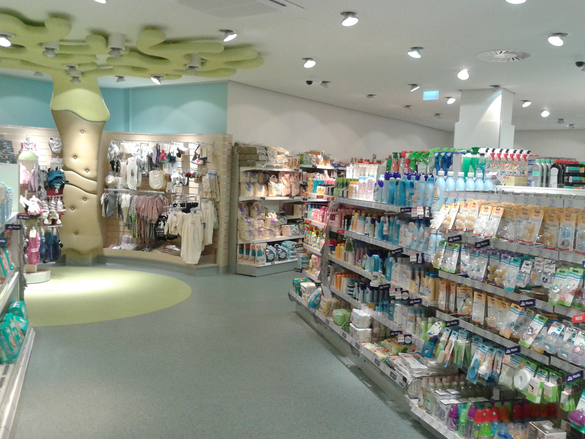 DM-Markt in Mannheim, P2, an den Planken